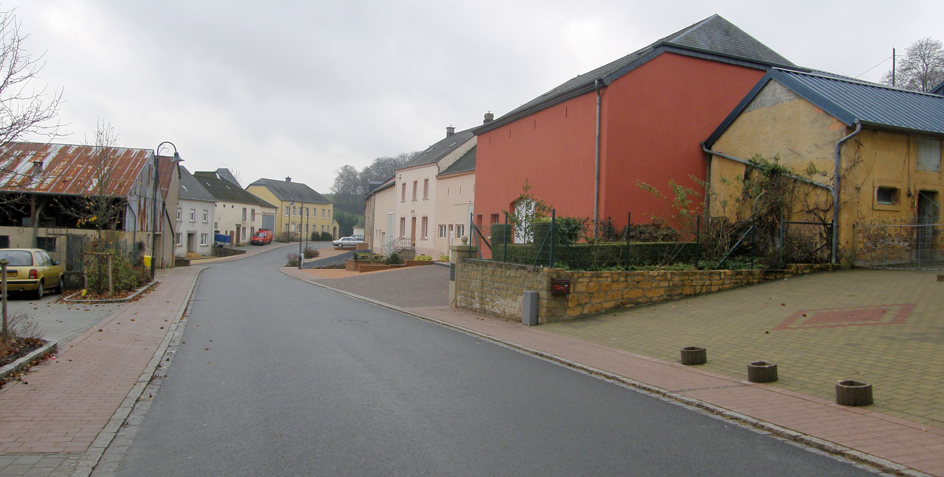 Nojem.